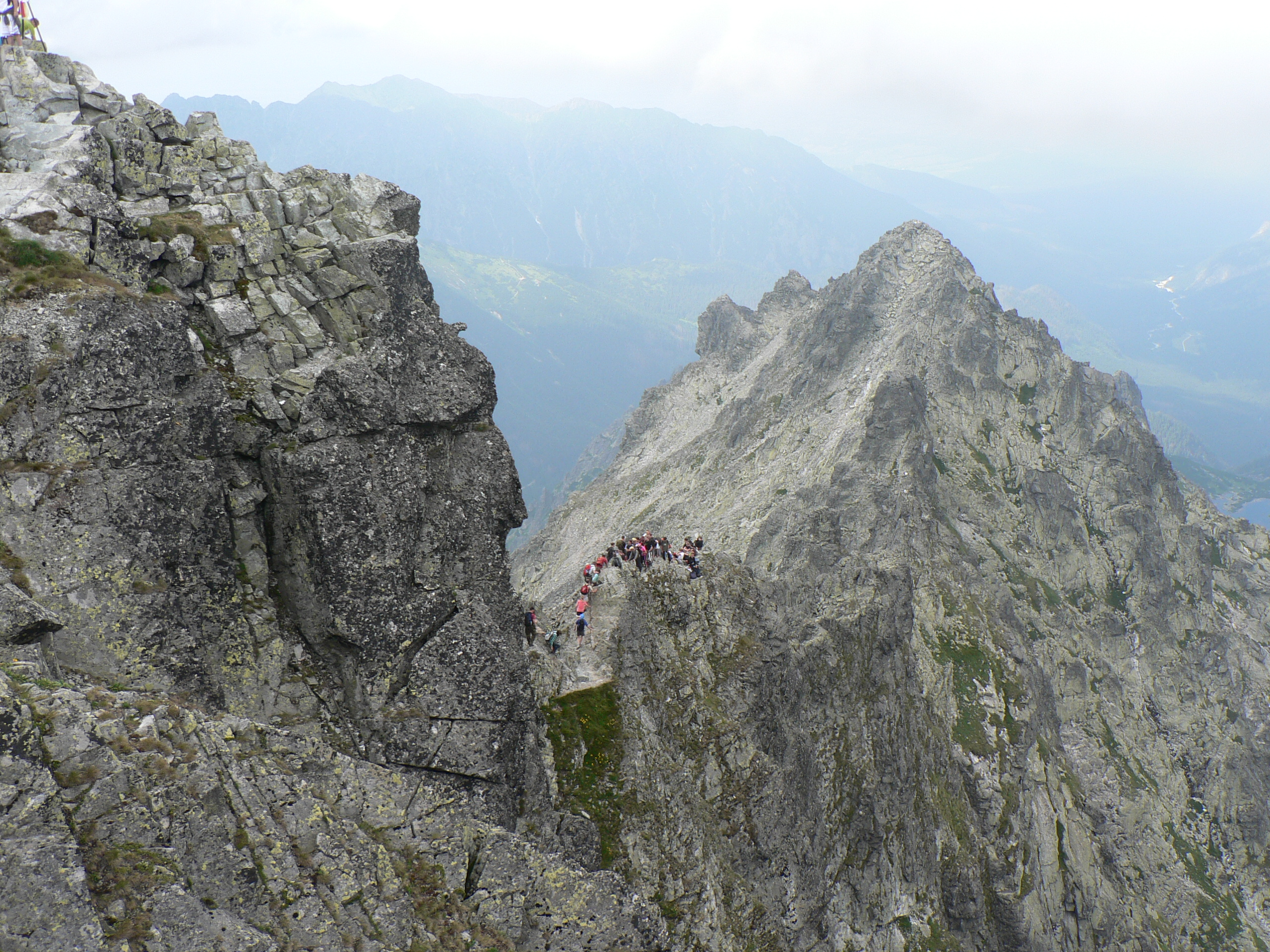 Szlak na Rysy i Niżnie Rysy z wierzchołka Rysów